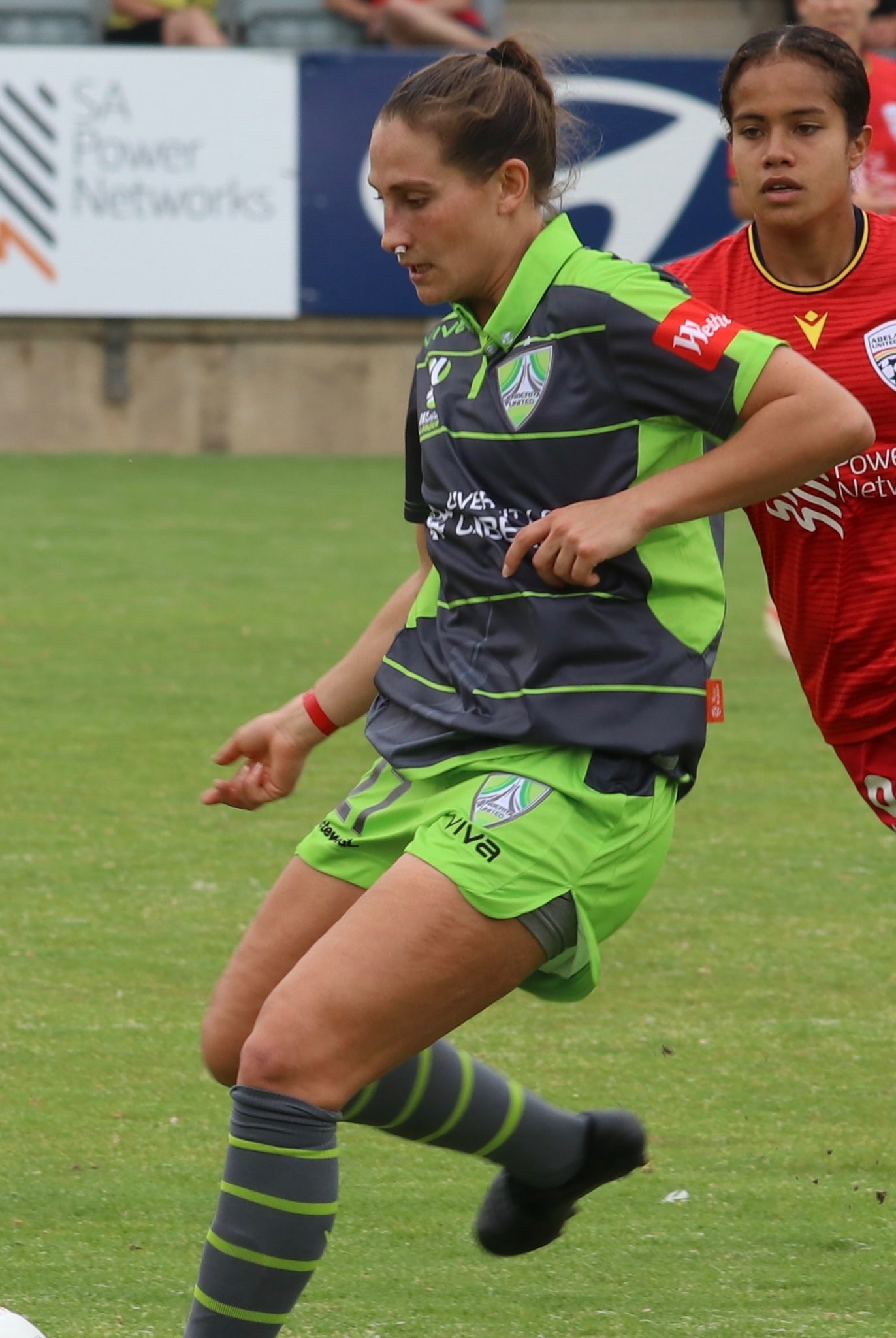 Kurtz